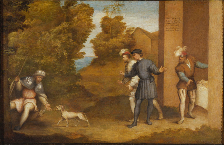 Autore Pordenone (Giovanni Antonio De Sacchis) Anagrafica Pordenone 1483 circa - Ferrara 1539 Titolo San Rocco e il cane Datazione 1525-1526 circa Provenienza collezione Guglielmo Lochis, 1866 Tipologia dipinto Tecnica olio su tavola trasportato su tela Inventario 81LC00198 Misure 60,3 x 92,4 cm Collocazione Sala 16